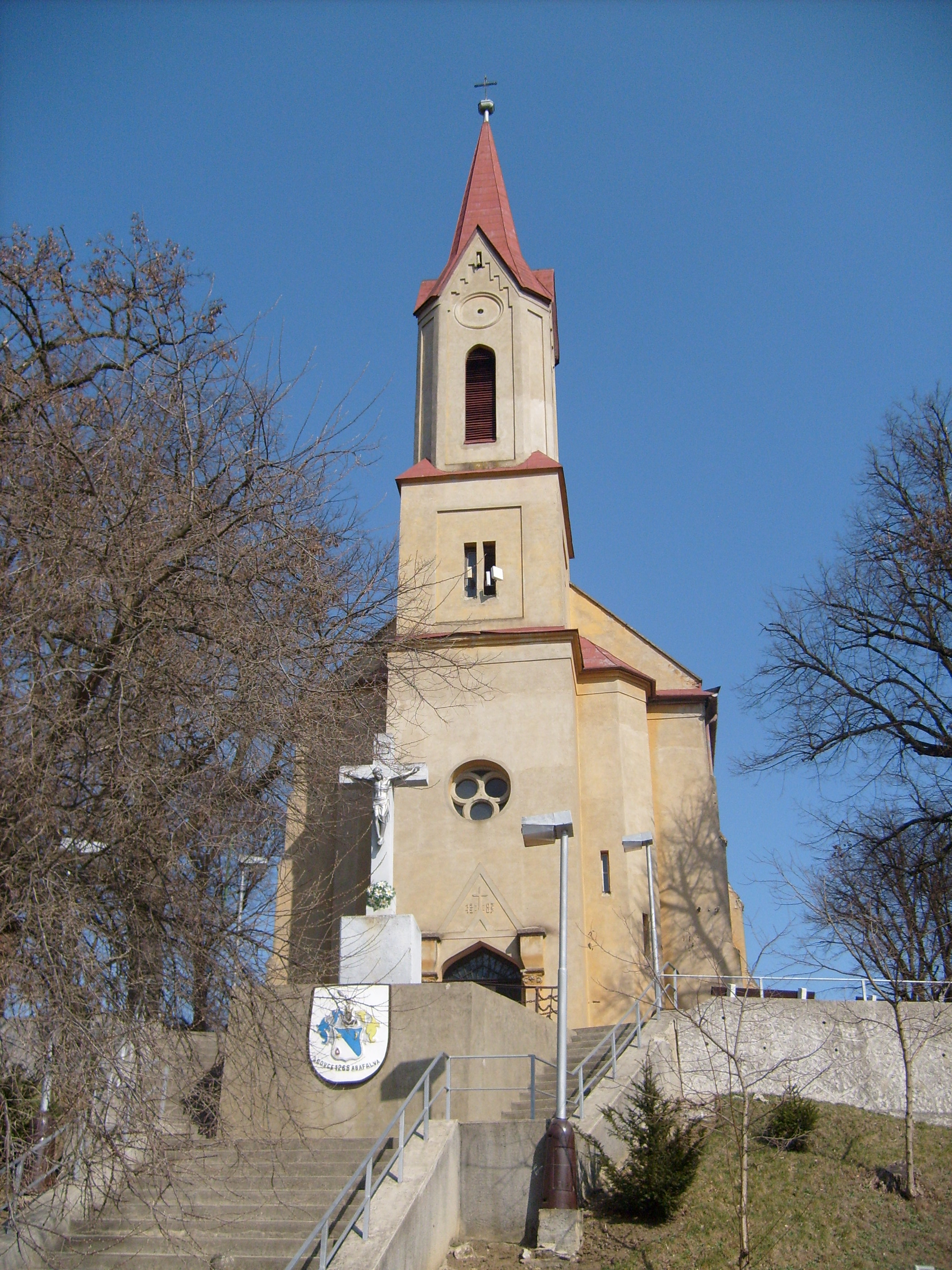 Rímskokatolícky Kostol Nanebovzatia Panny Márie v Abovciach (okr. Rimavská Sobota)